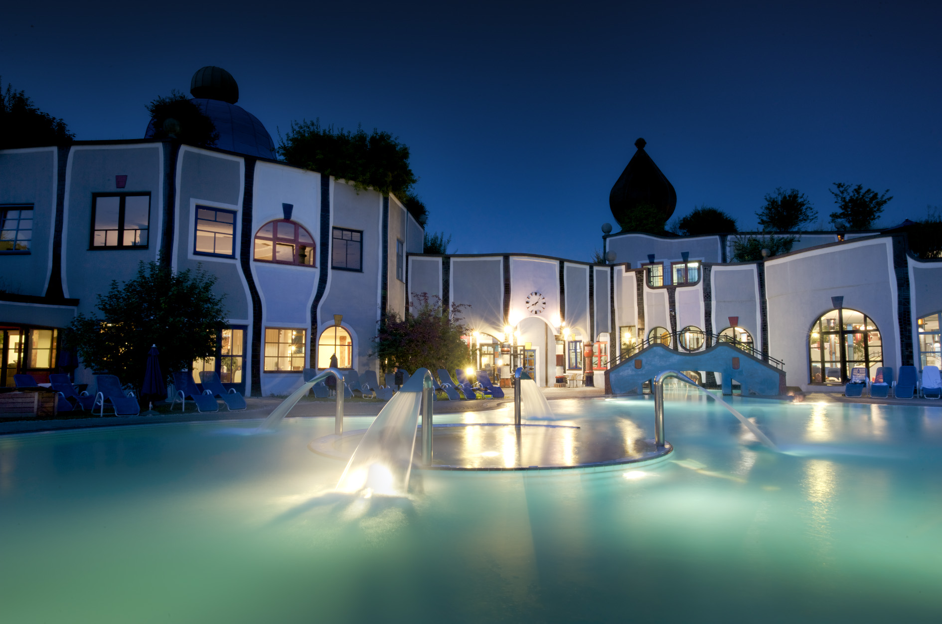 Das Rogner Bad Blumau, in der Steiermark, Österreich, verfügt über eine einzigartige Thermalquelle, die Vulkaniaquelle. Mit dieser Heilquelle wird der gesamte Thermal- und Hotelbereich völlig energieautonom und umweltfreundlich betrieben.